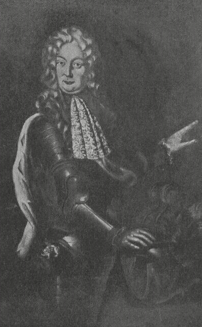 Seite 5, Abbildung 5, Untertitel: Markgraf Christian Ernst (1655-1712). Sammlung Giessel, Bayreuth.